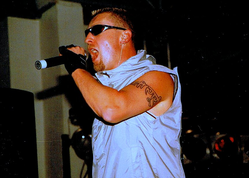 Front 242 live im Werk II in Leipzig 1